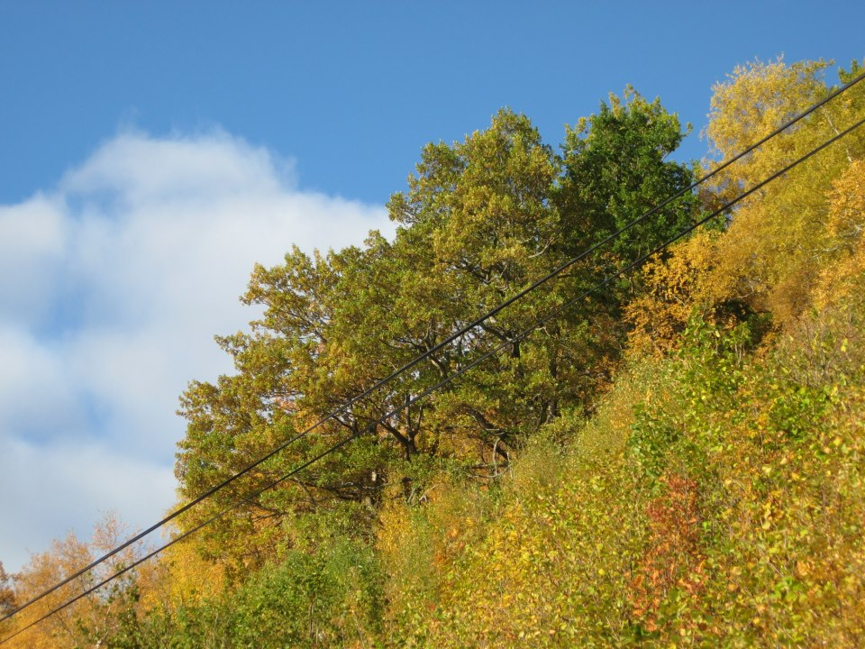 Eiketrær i Legene på Lekneset